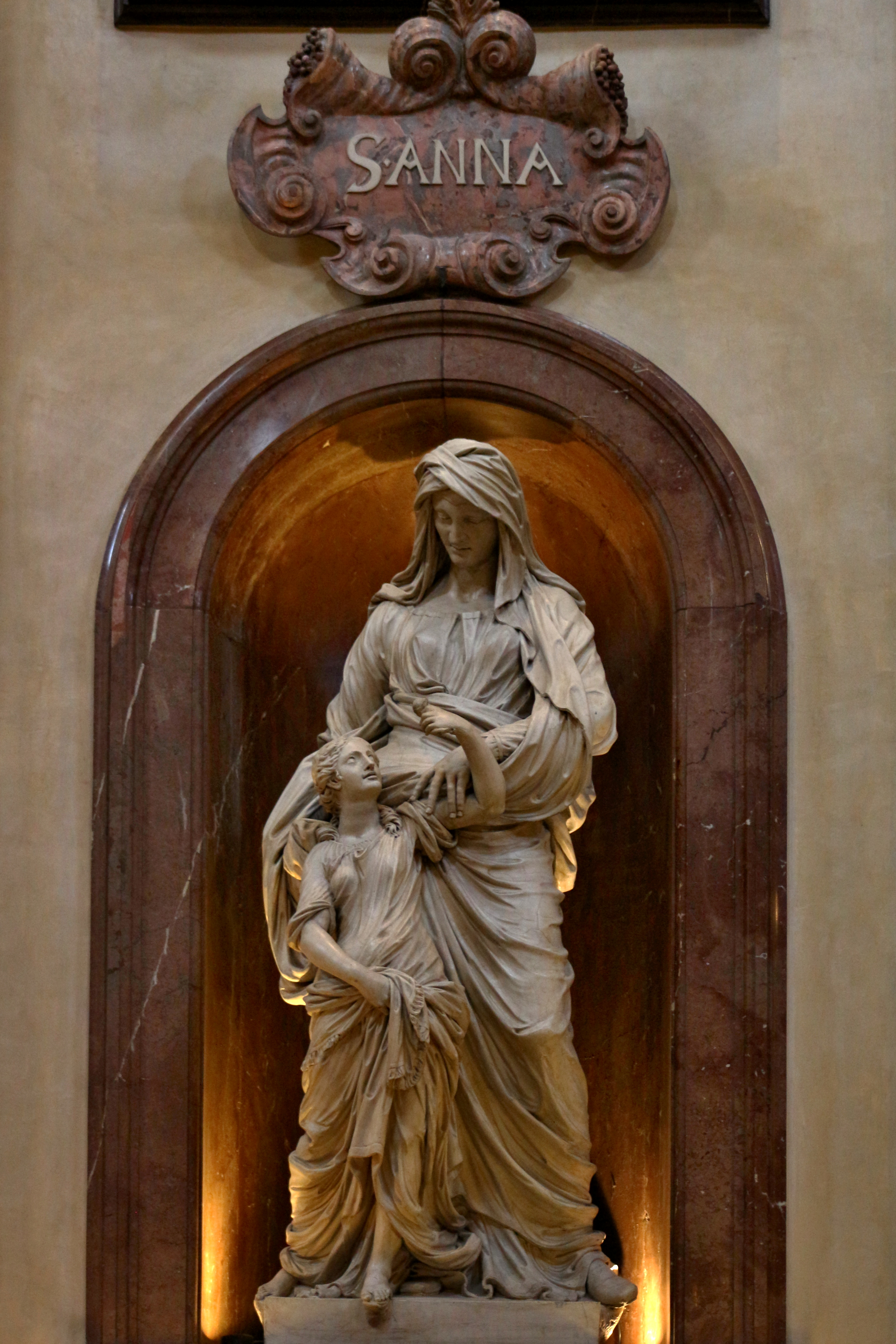 Praha 1-Staré Město, interiér kostela sv. Františka z Assisi u křižovníků